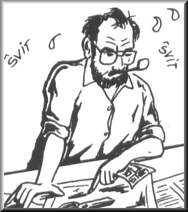 mem farita desegno. libera